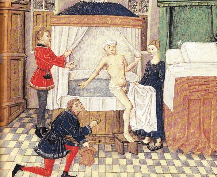 Sortie du bain de Valère Maxime. Le cuvier est recouvert d'un dais non pour masquer la nudité mais pour se protéger du froid et des courants d'air.